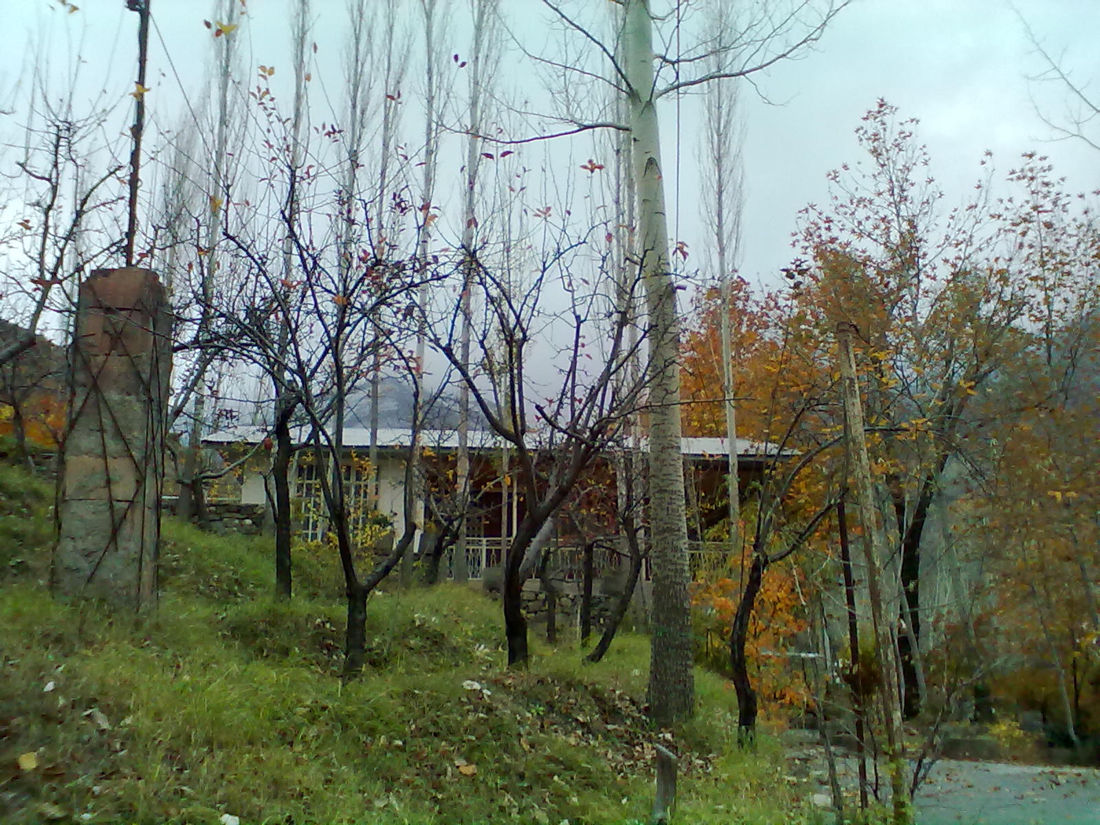 طبیعت گردی و اکوتوریسم جاده هراز لاریجان